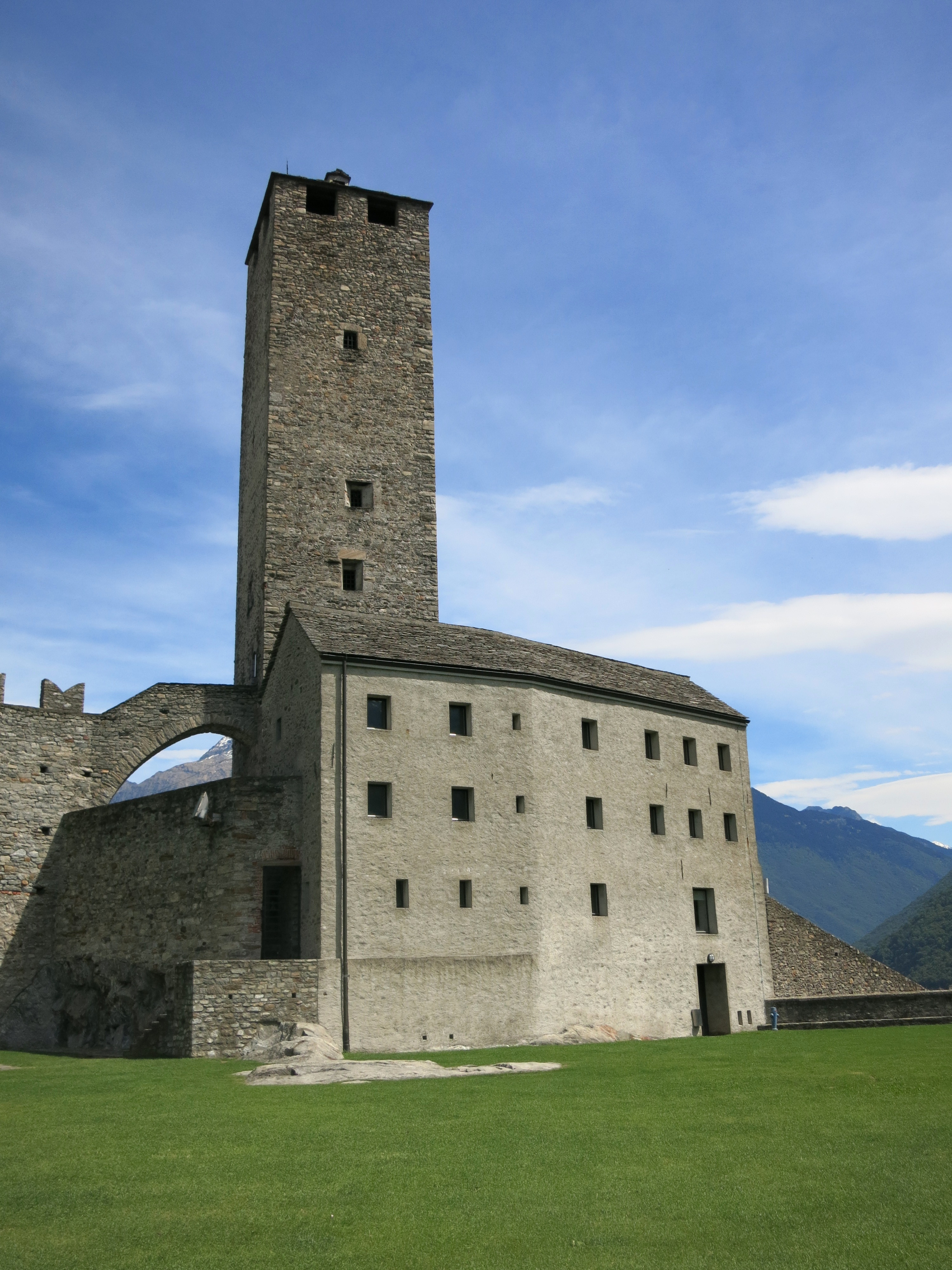 Torre Bianca, Bellinzona